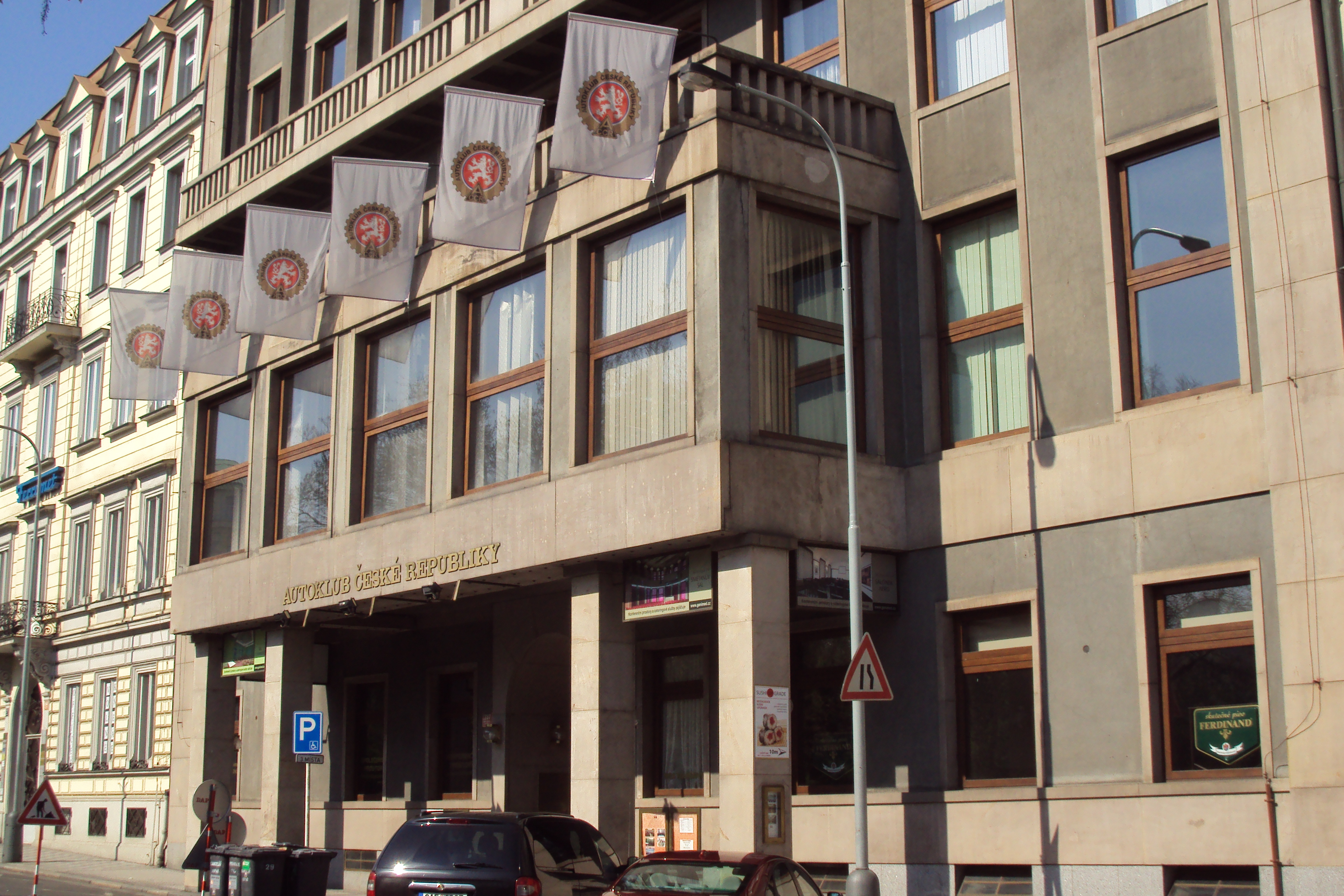 Budova Autoklubu, Opletalova 1337/29, Praha 1-Nové Město.